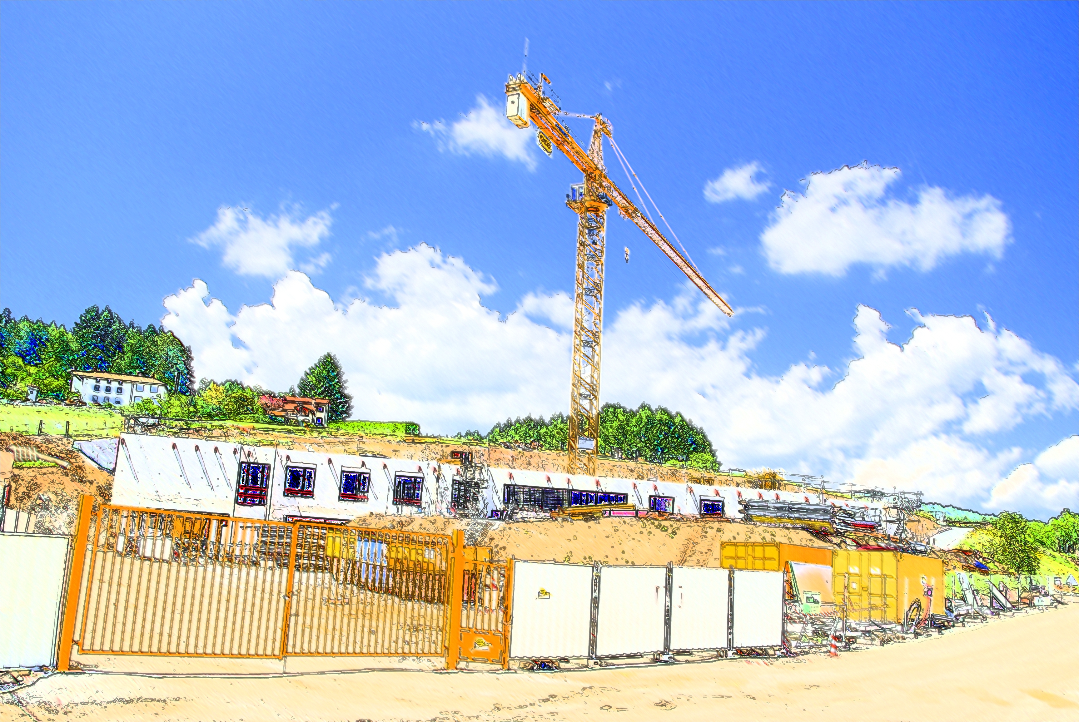 Chantier en cours du futur hôpital de Grandris (69870), attenant à l'ancien hôpital/hospice, vallée d'Azergues, Beaujolais Vert, département du Rhône (69), en France.